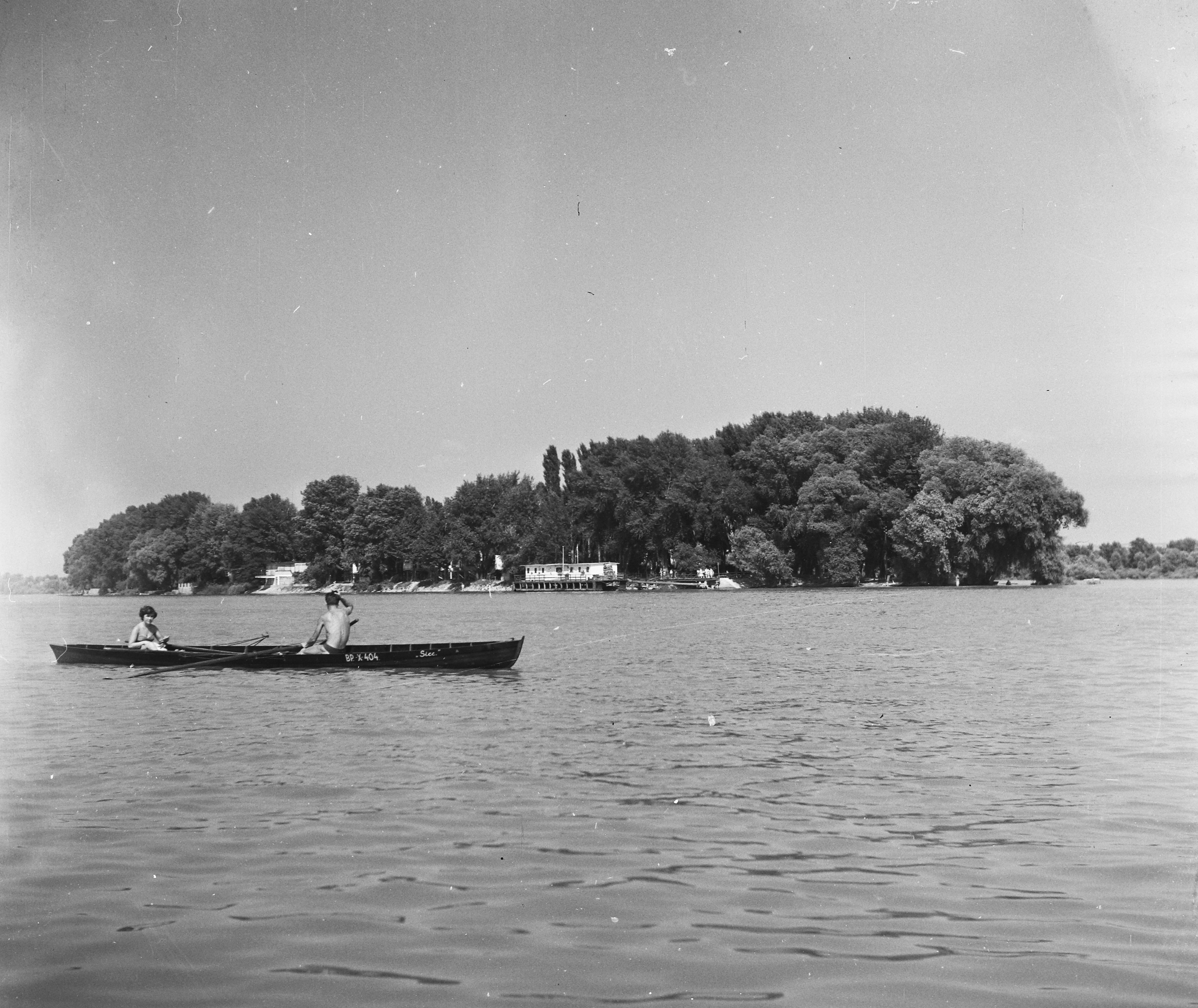 Szentendrei Duna-ág, szemben a Lupa-sziget. Location: Hungary Tags: boat, paddling Title: Szentendrei Duna-ág, szemben a Lupa-sziget.